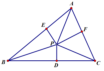 使用几何画板软件绘制